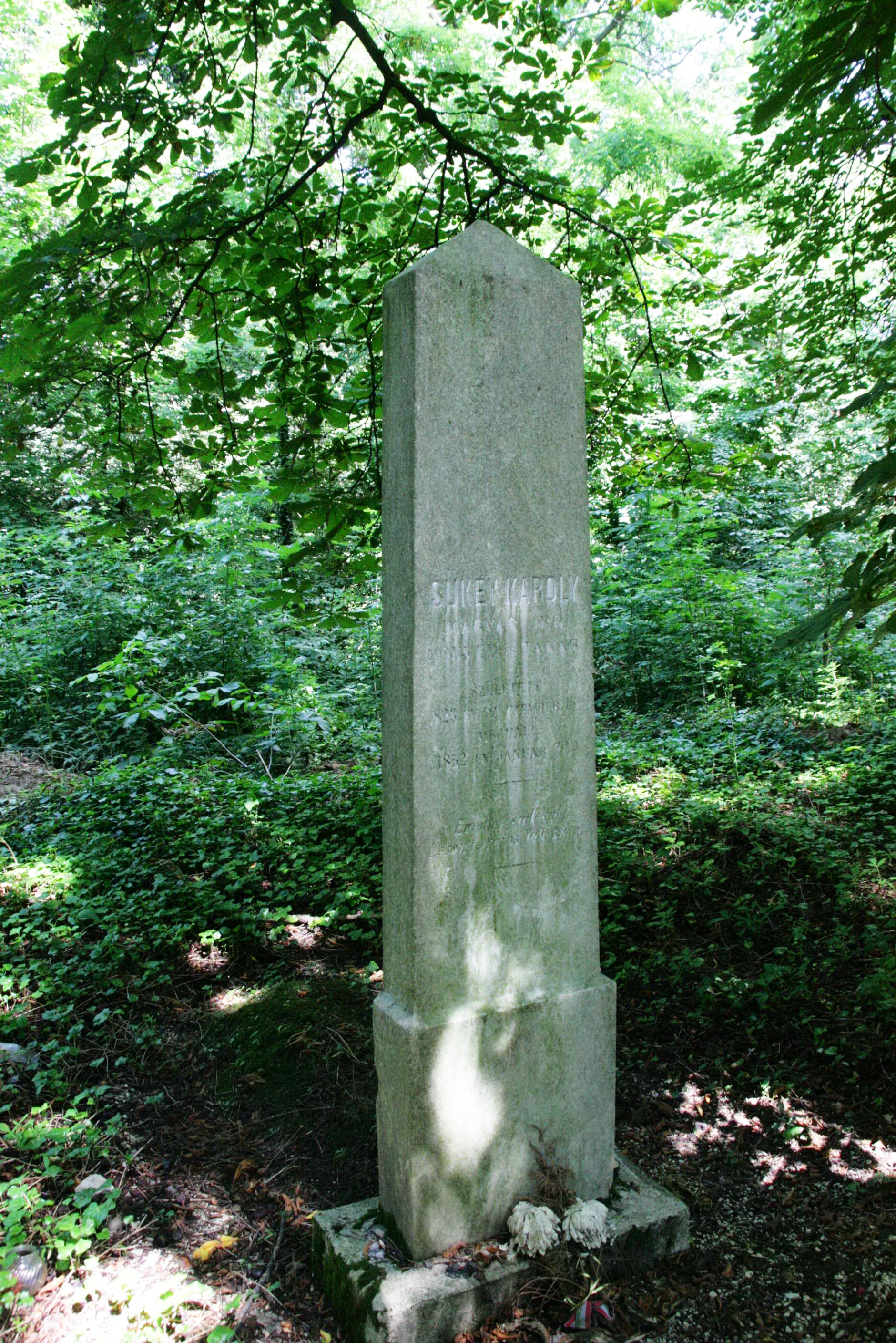 Losonc - temető - Sükey Károly síremléke